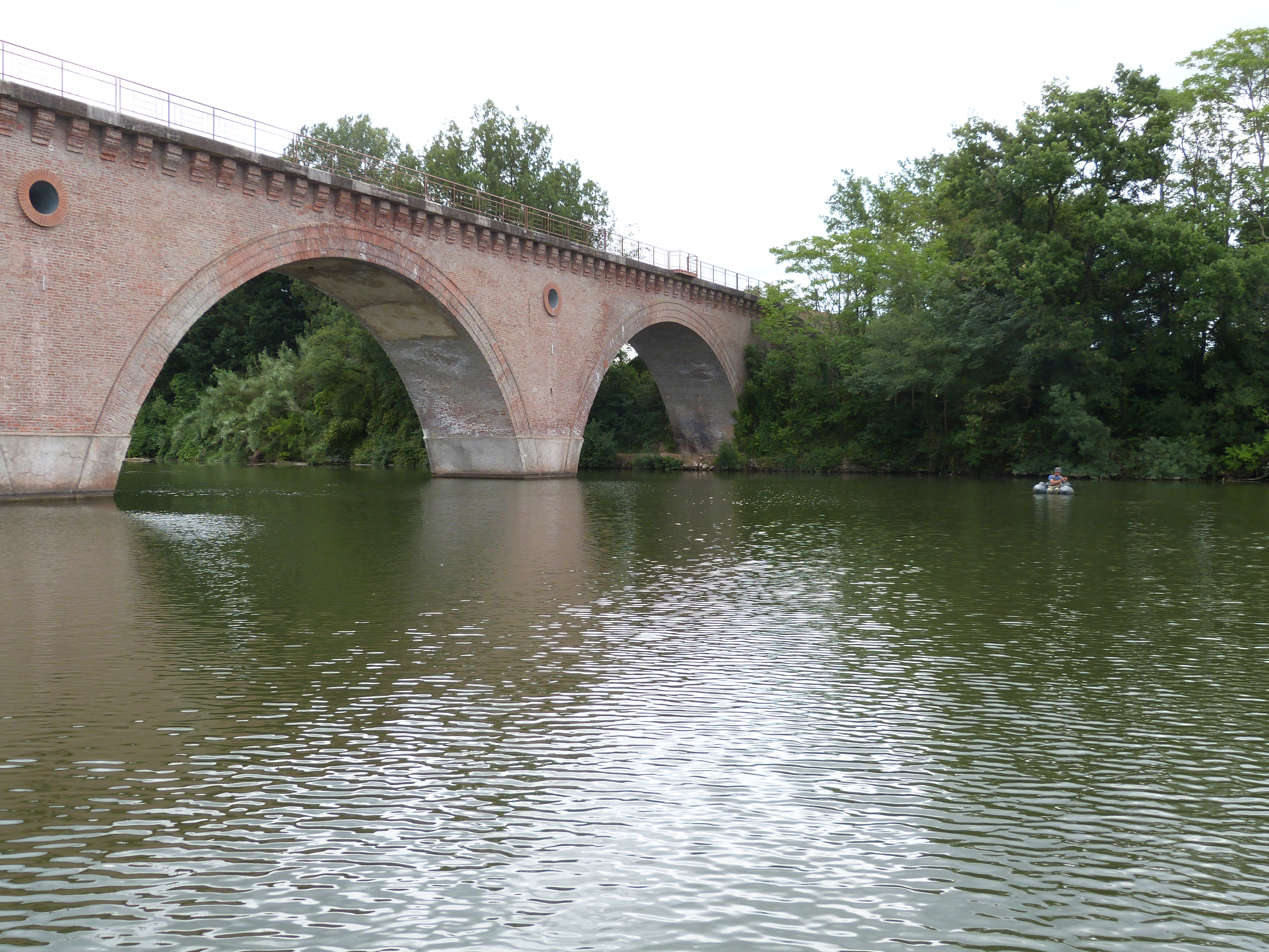 Vue partielle du pont ferroviaire traversant le Tarn à Marssac-sur-Tarn (Tarn)